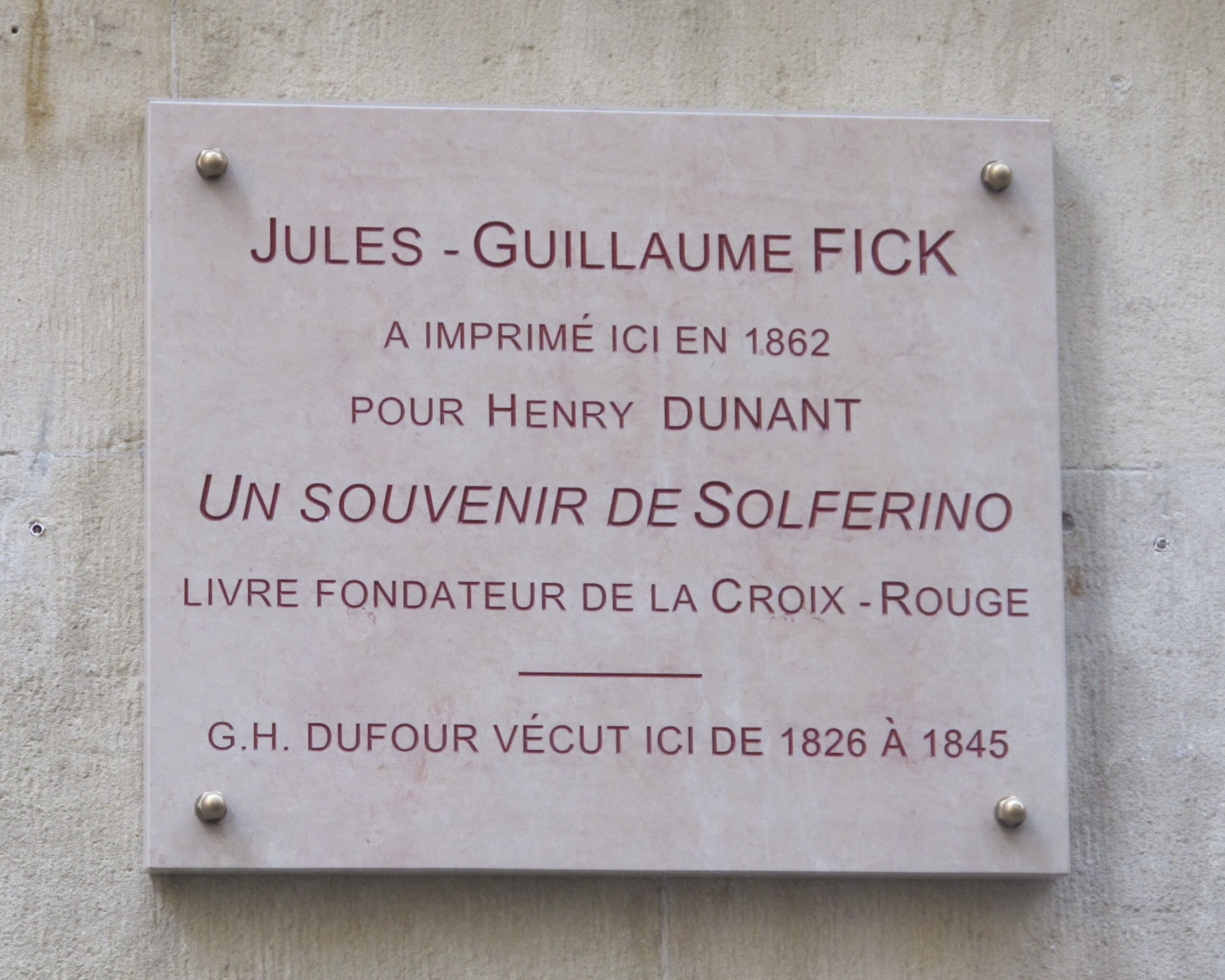 Мемориальная доска в Женеве на доме, где жил генерал Дюфур и была напечатана книга Анри Дюнана «Воспоминания о битве при Сольферино»